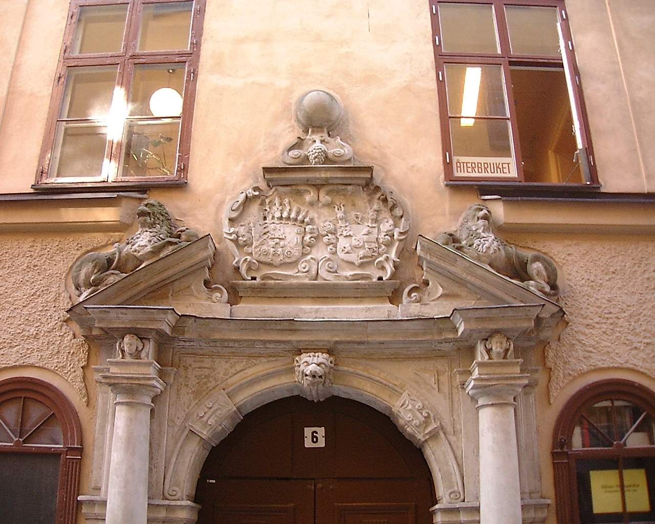 Portico of 6, Svartmangatan (Ceres 13), Gamla stan, Stockholm.